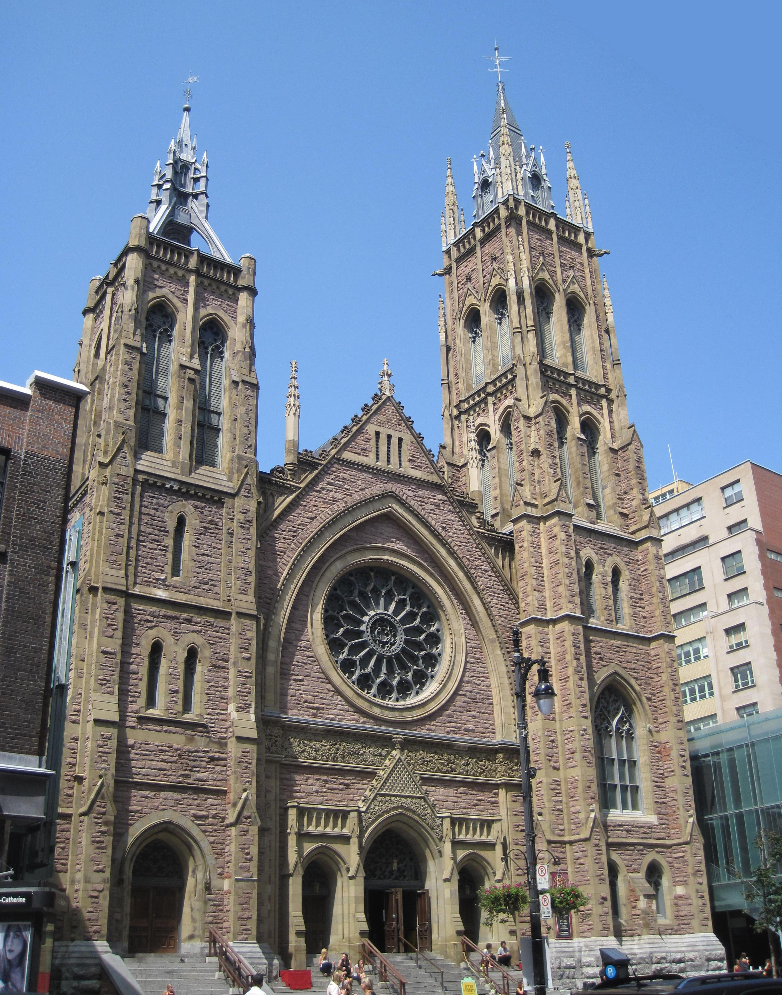 Le portail de Église Unie Saint-James de Montréal (2010)